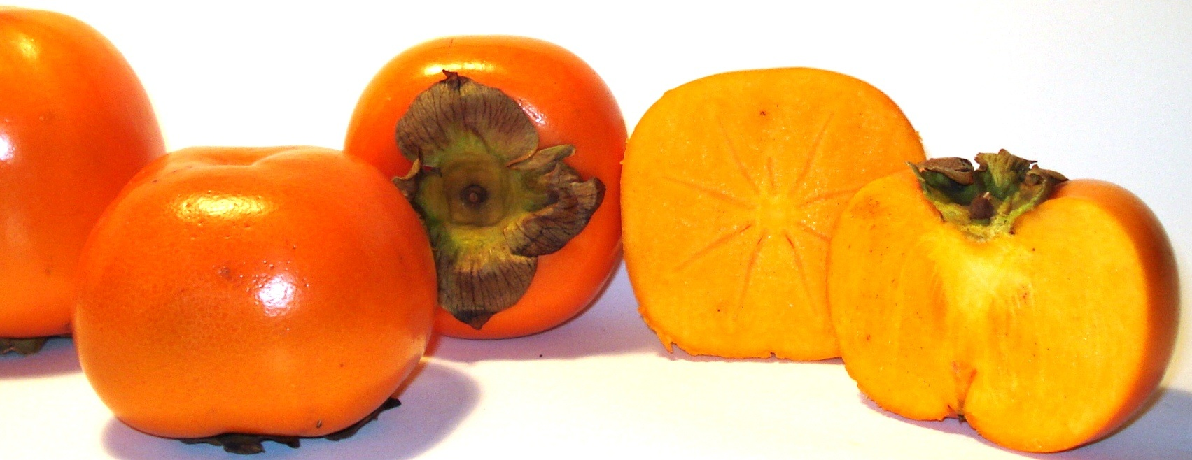 Diospyros kaki Sharon - fruits